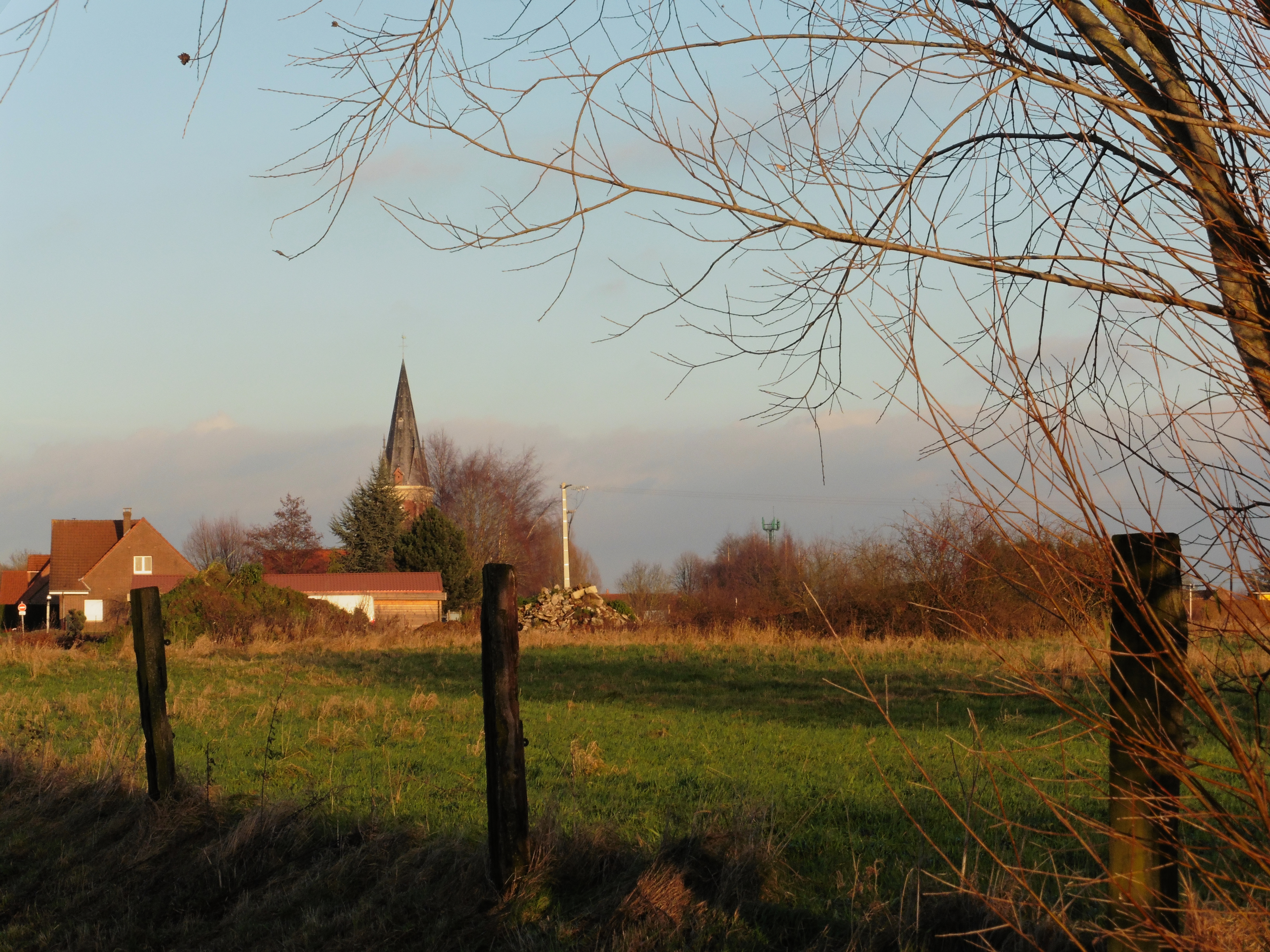 Aubers Village du Pays des Weppes .- Nord Nord-Pas-de-Calais.- France.